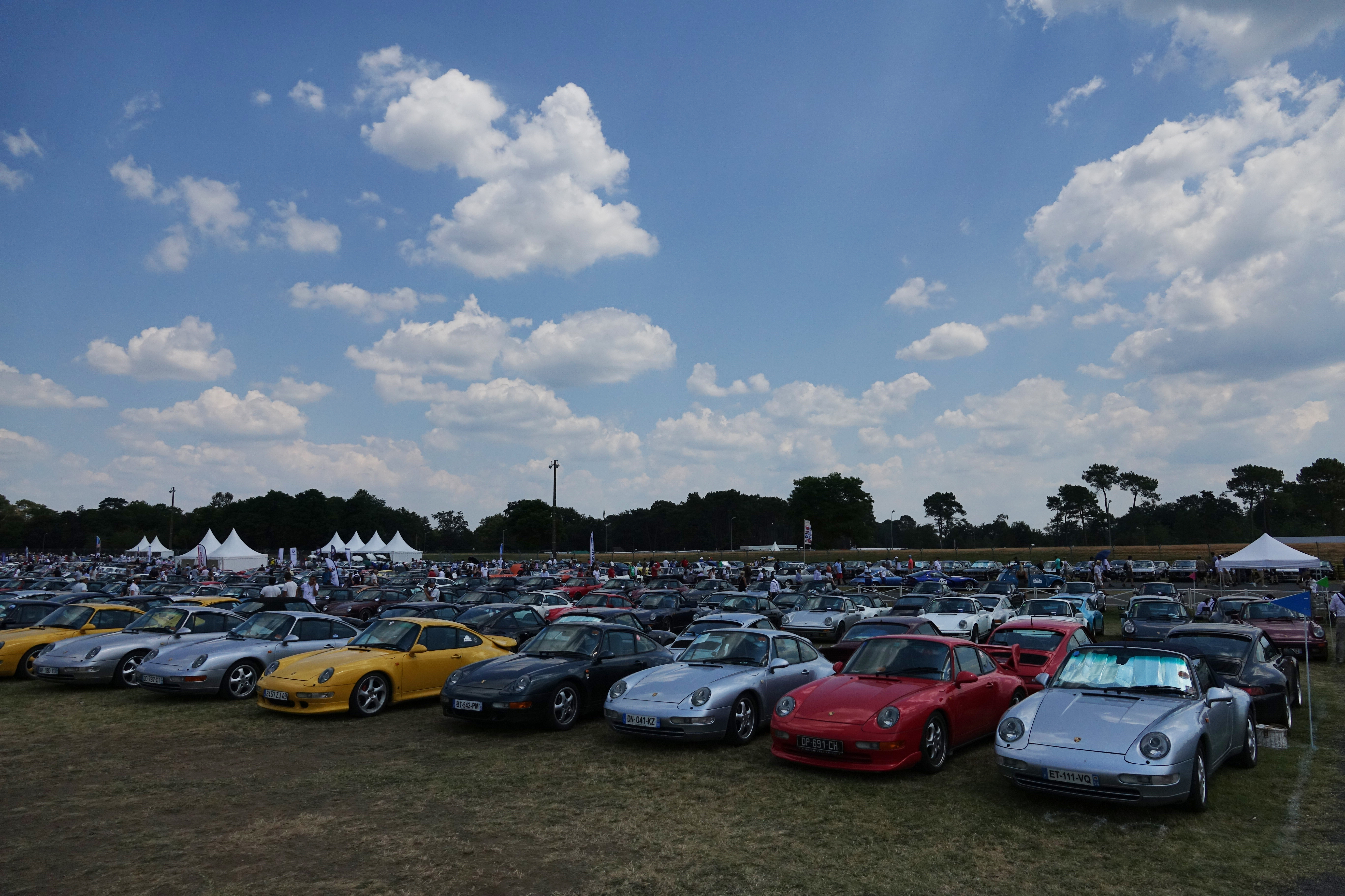 Le Mans Classic 2018 - Expositions des clubs